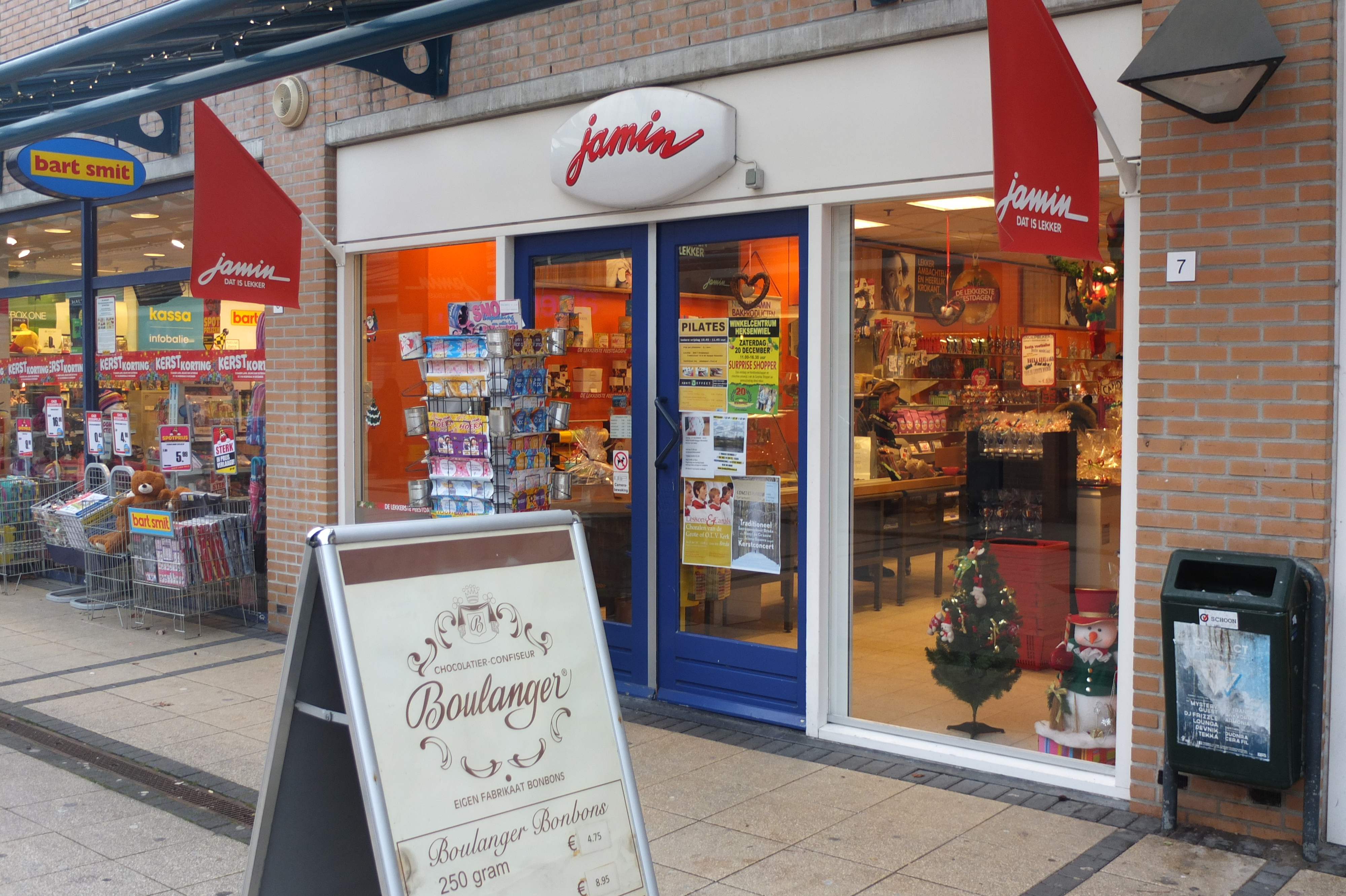 Voormalige Snoepwinkel Jamin gevestigd op het winkelcentrum Heksenwiel (Breda) naast Bart Smit